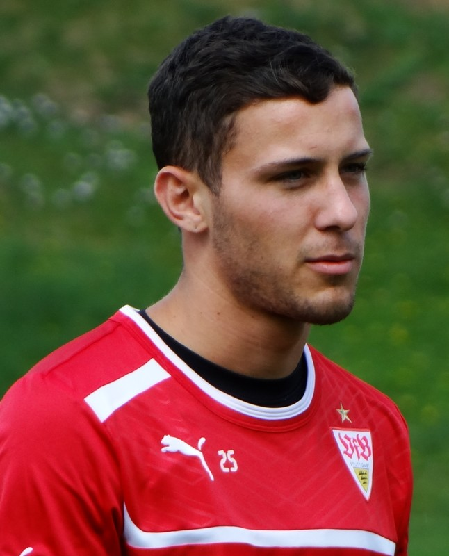 Lukas Kiefer beim Auftakttraining 2012/13. Aufgenommen von